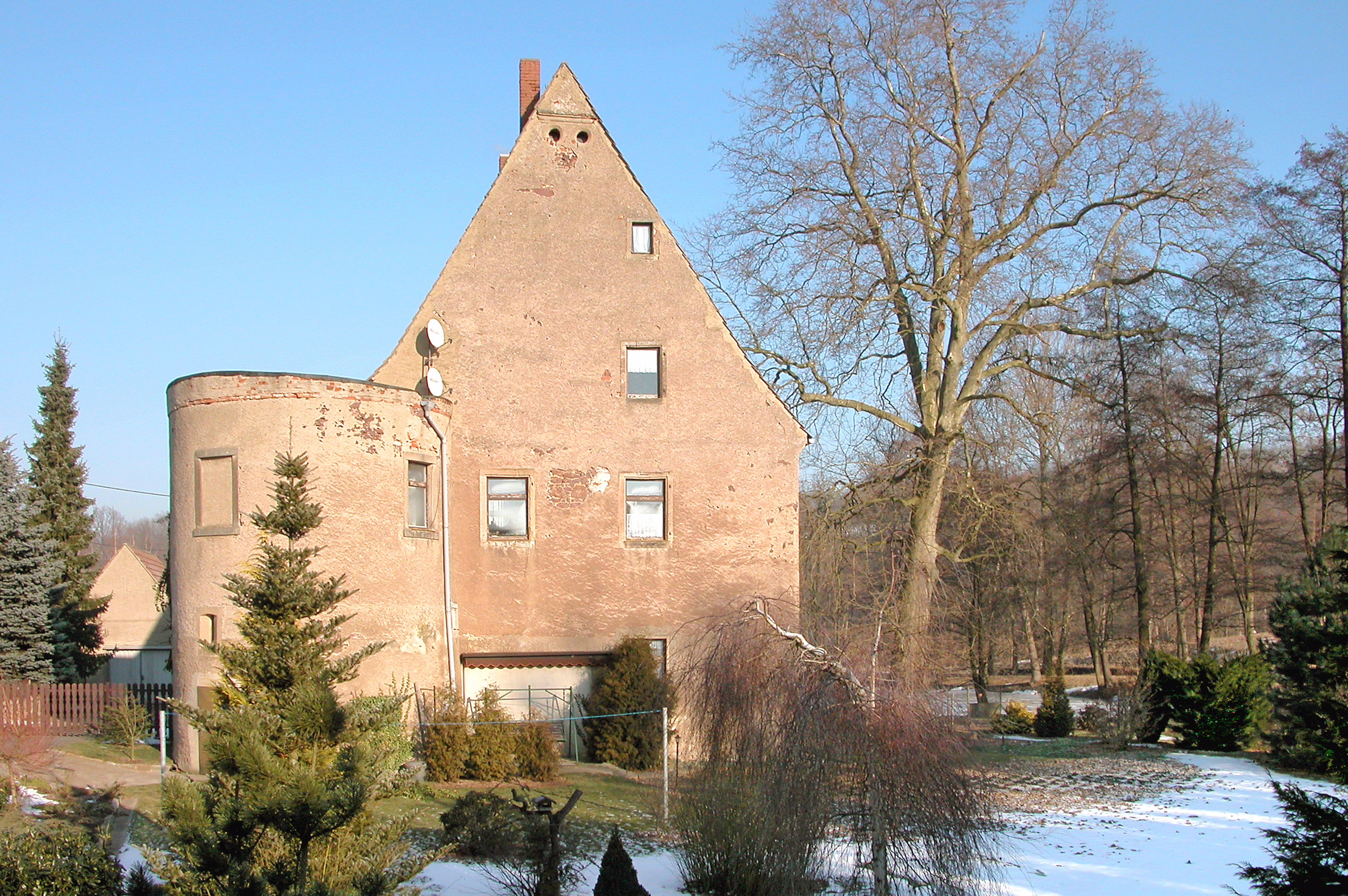 28.01.2006 01665 Sornitz (Käbschütztal): Ehemaliges Wasserschloß. Im Kern spätes 15. Jh. Nach 1945 architektonisch stark verflacht. [DSCN8600.TIF]20060128120DR.JPG(c)Blobelt